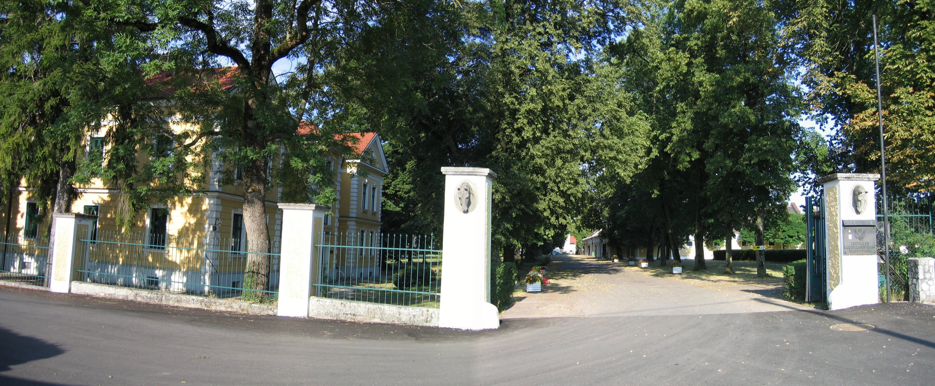 Haupteingang des Pferdezentrums Stadl-Paura